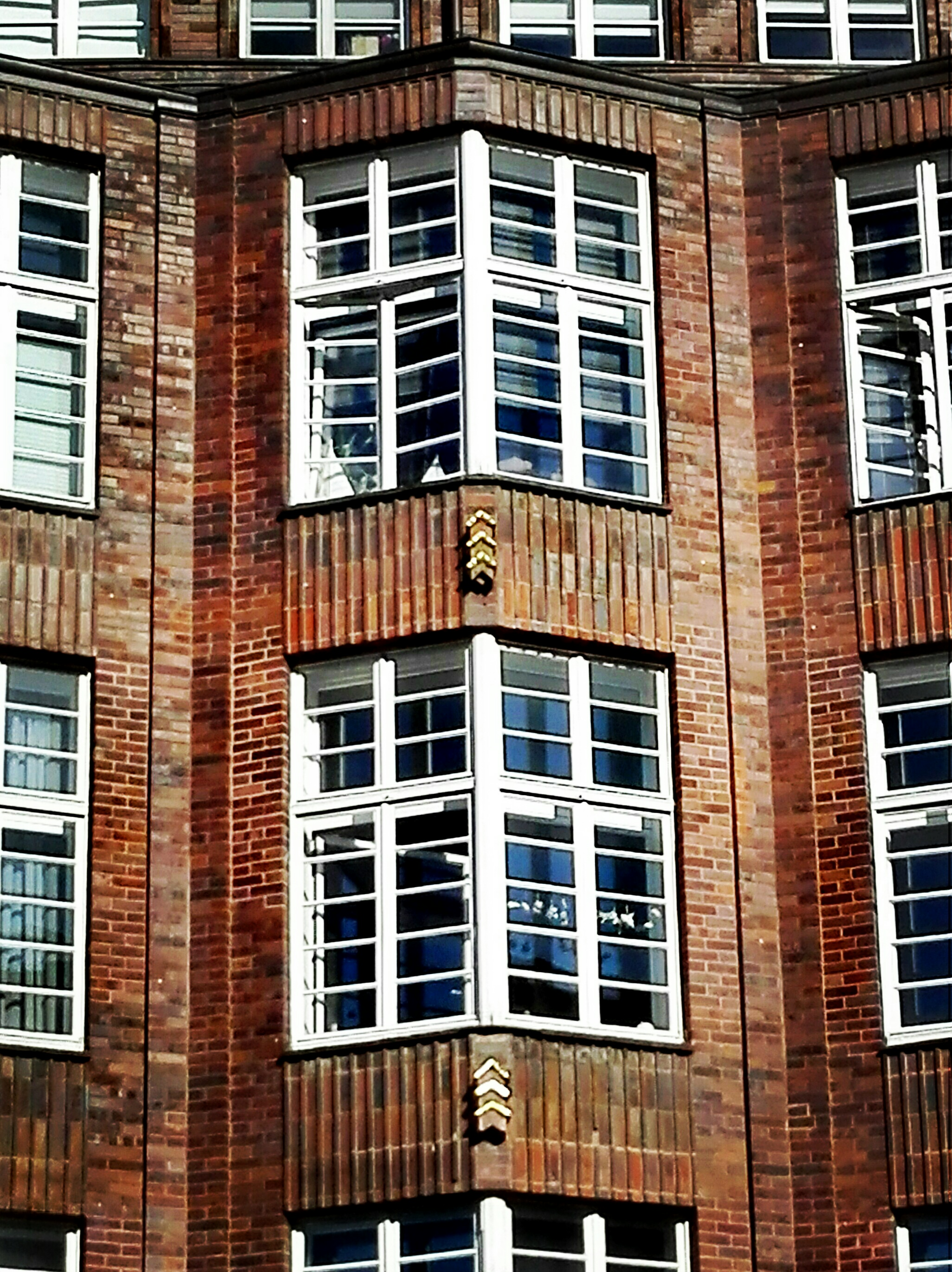 Fenster mit verzierenden Plastiken an der denkmalgeschützten Fassade.